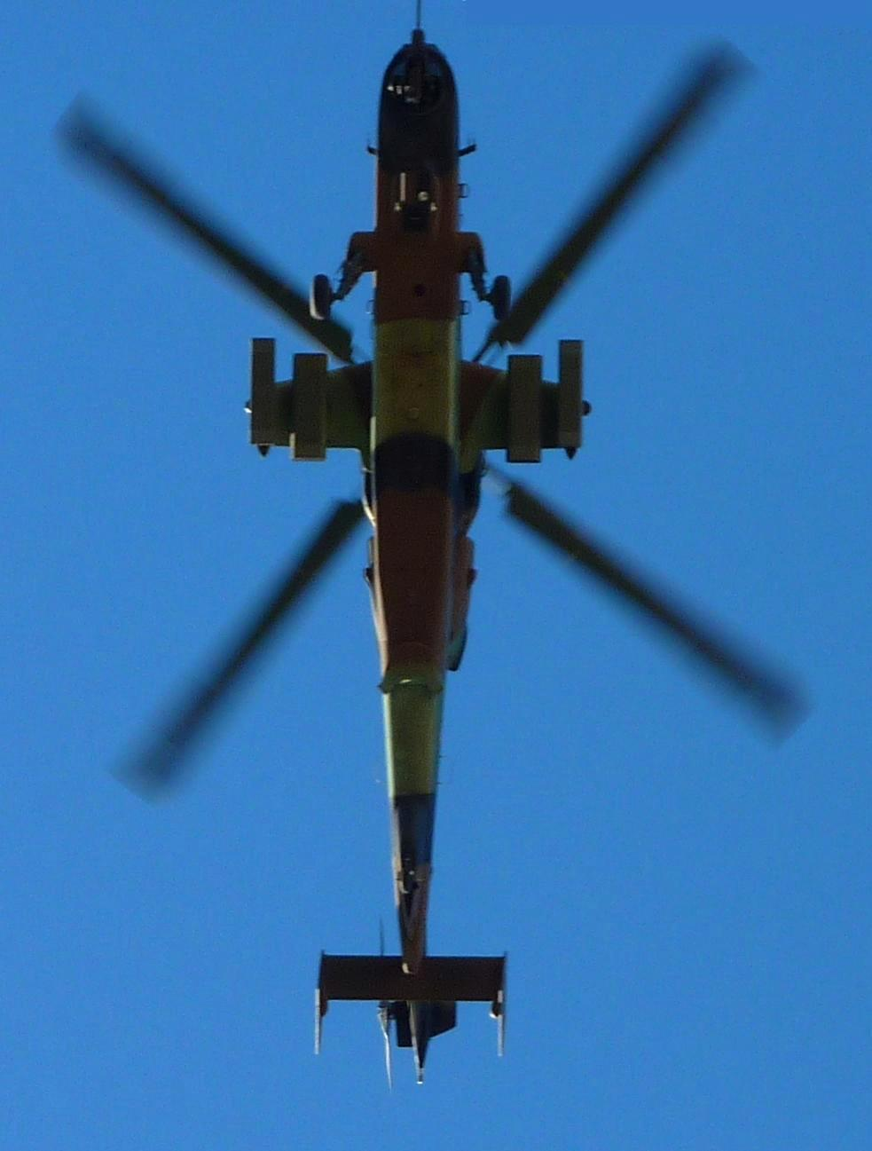 Tigre HAP del Ejército Español.